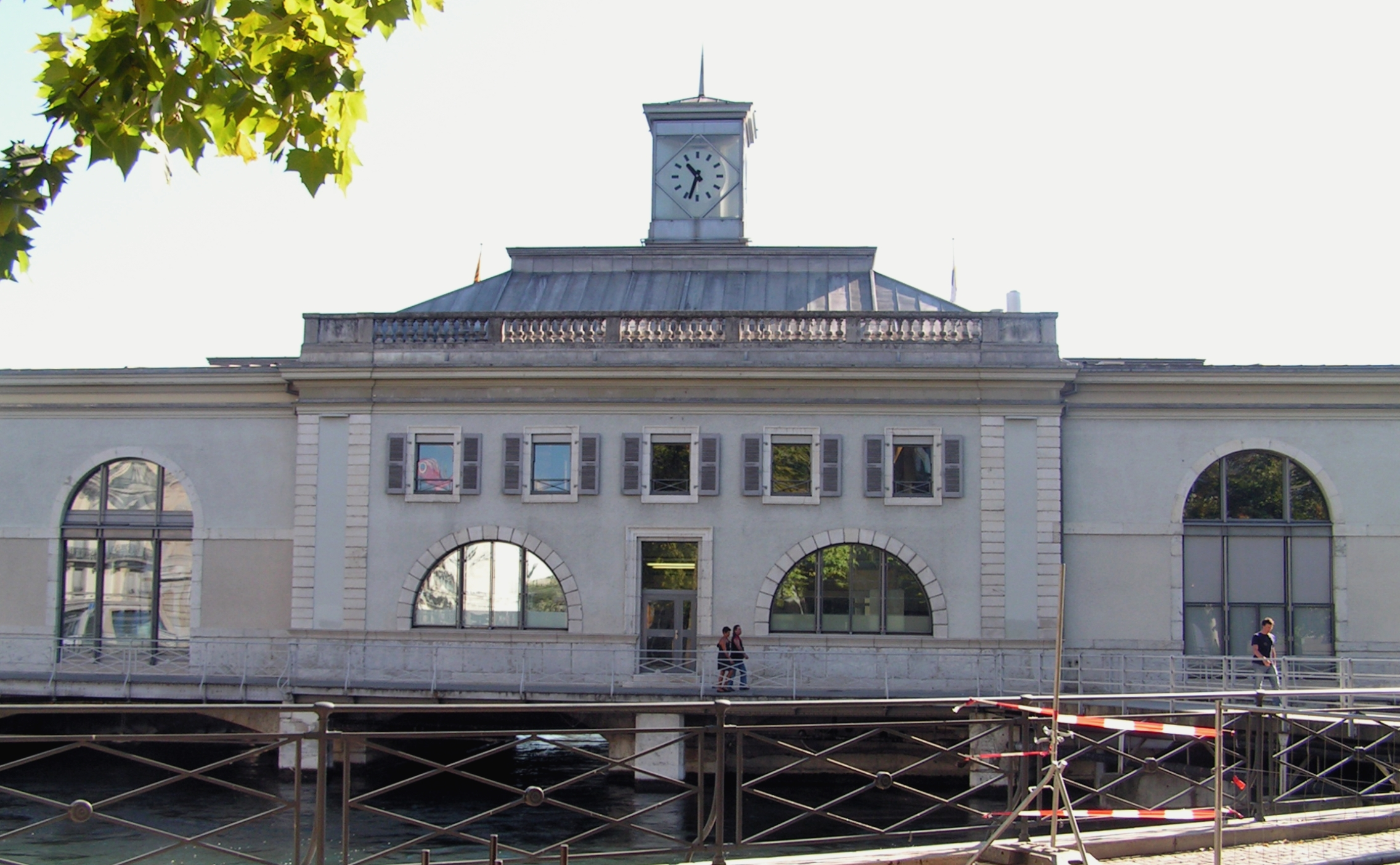 Pont de la Machine 1, Genève. Le pont de la Machine.